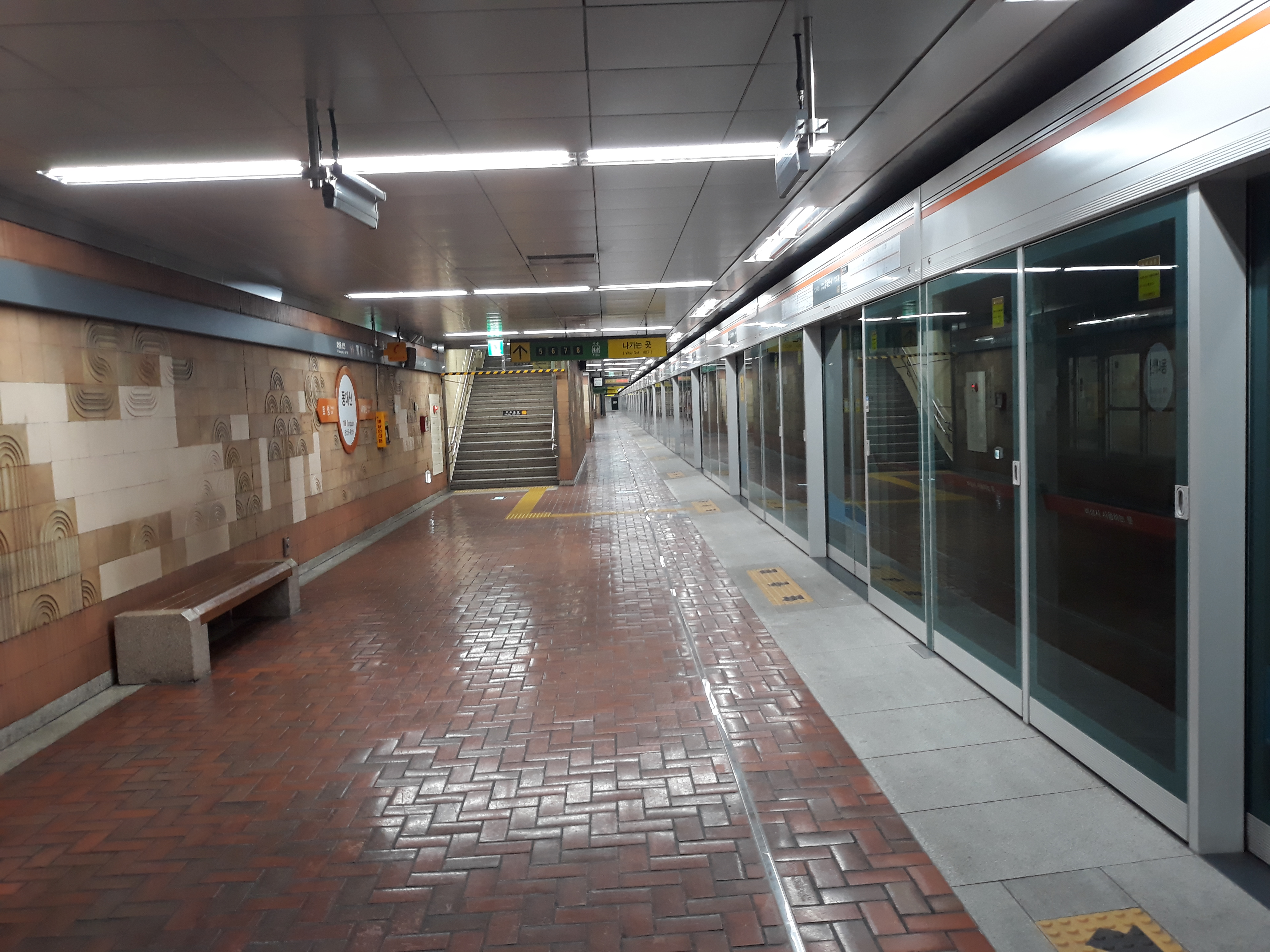 부산 도시철도 1호선 동대신역 노포 방면 승강장